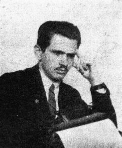 Jan Fethke (Jean Forge), pola verkisto, reĝisoro kaj esperantisto